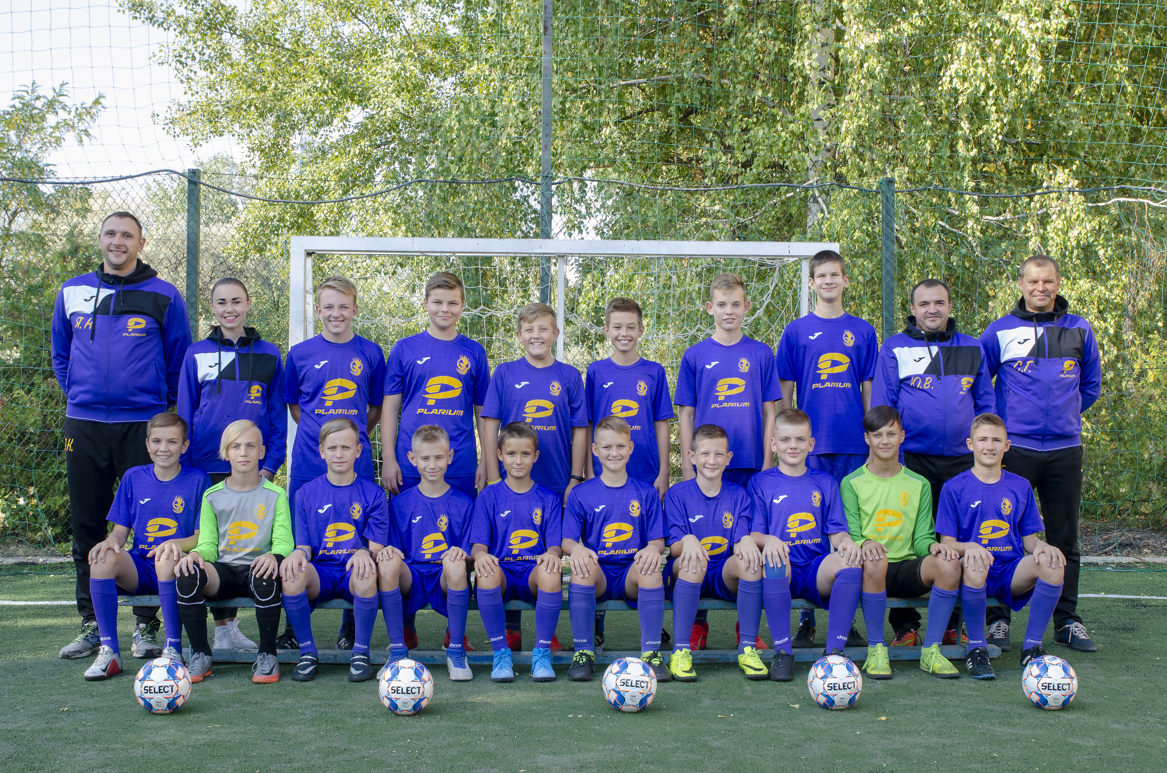 Фото ФК Феникс, 2019